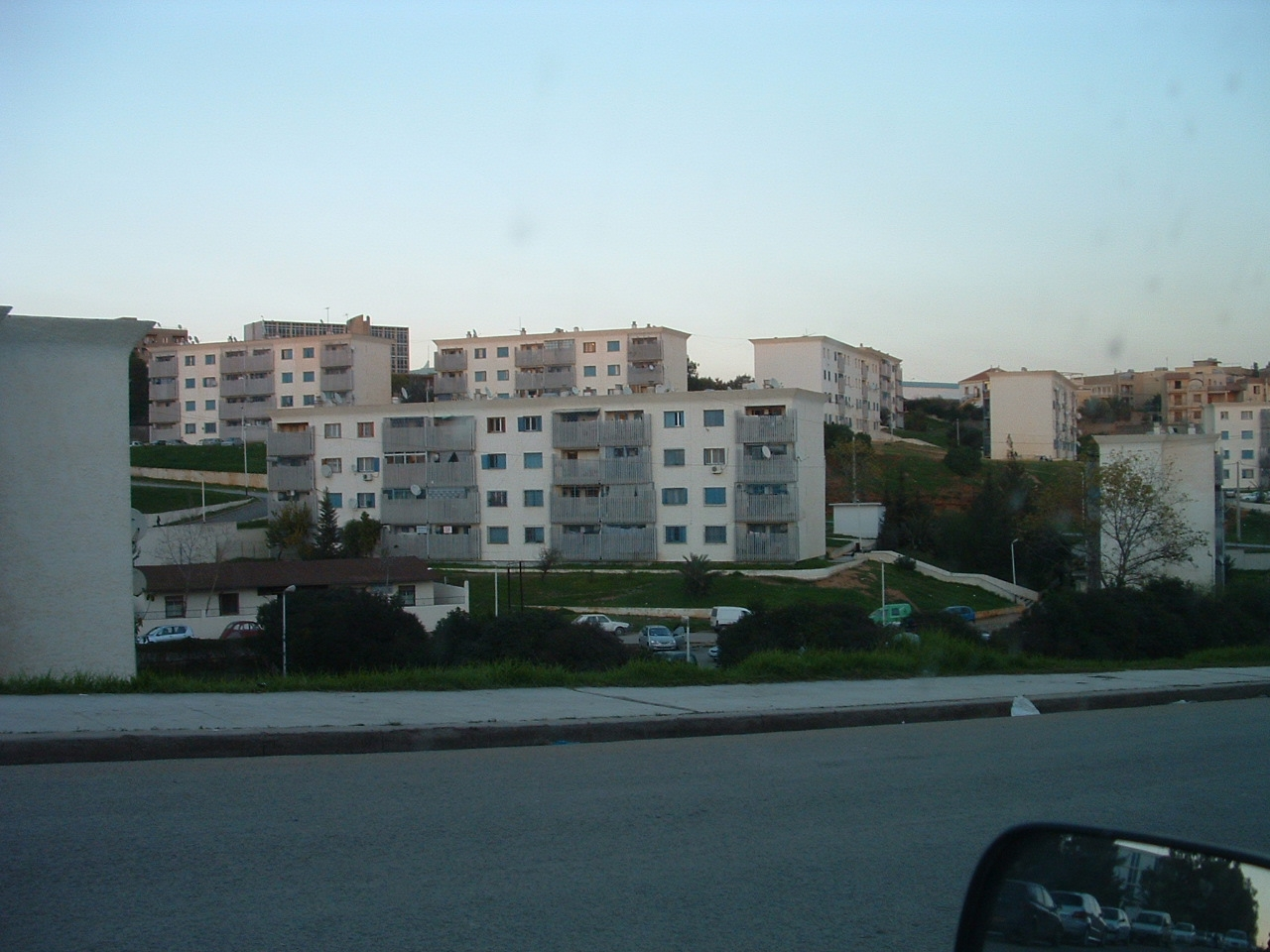 Photo personnelle offerte par son auteur